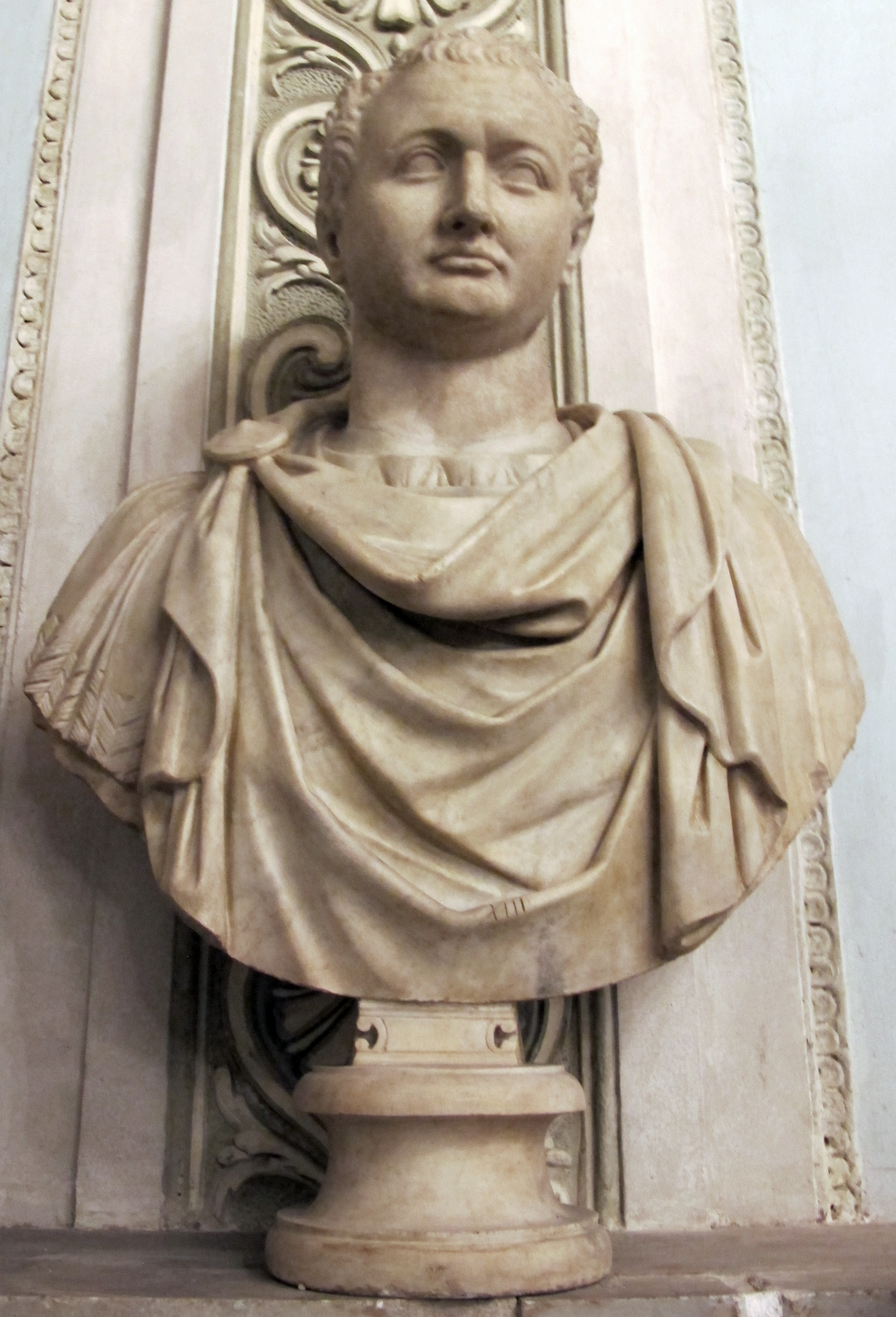 Musei Capitolini